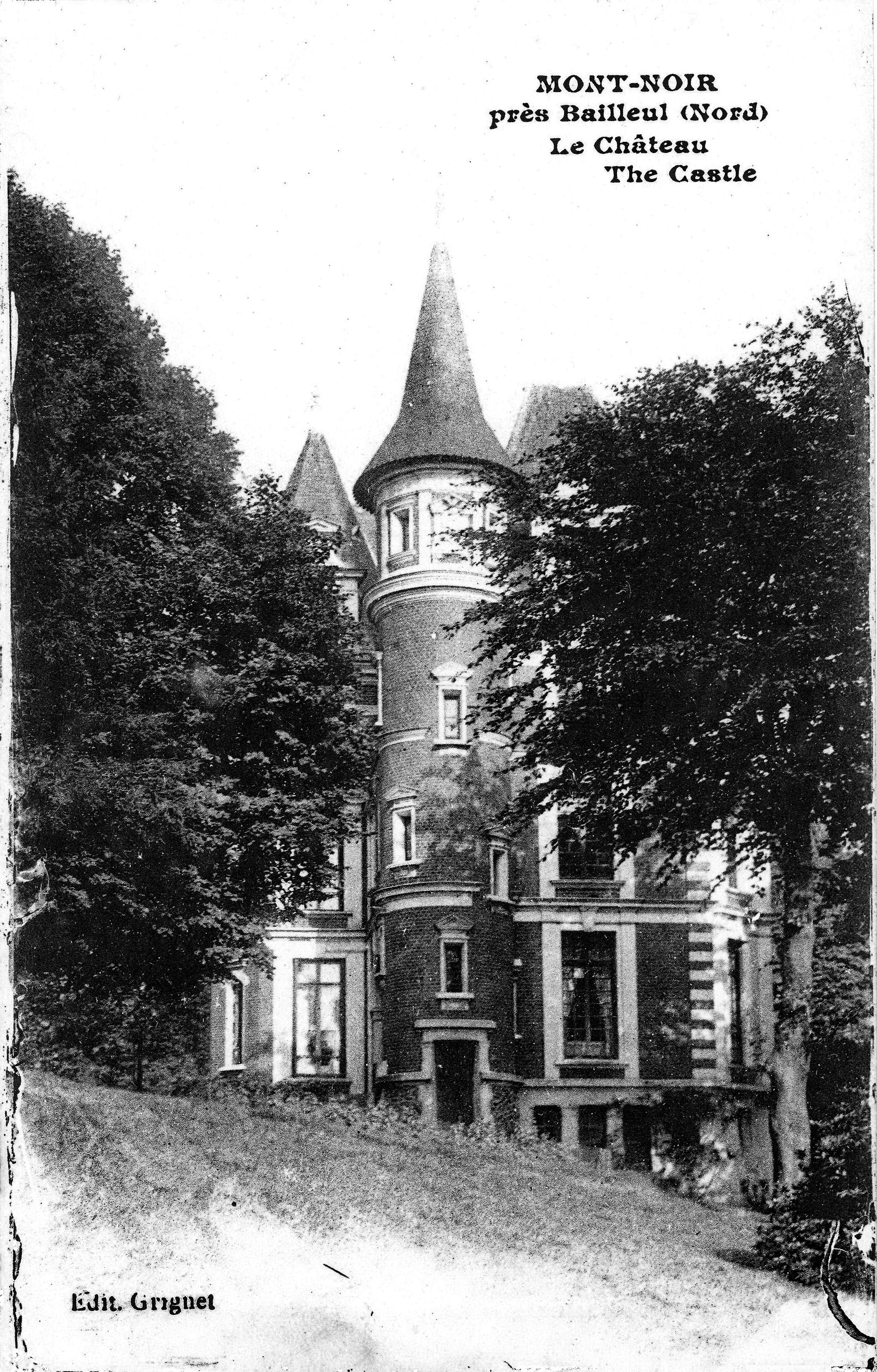 "Le Mont Noir" -Flandres Françaises- château d'enfance de l'écrivaine Marguerite YOURCENAR description voir § 2 : voir le livre de Marguerite Yourcenar Archives du Nord